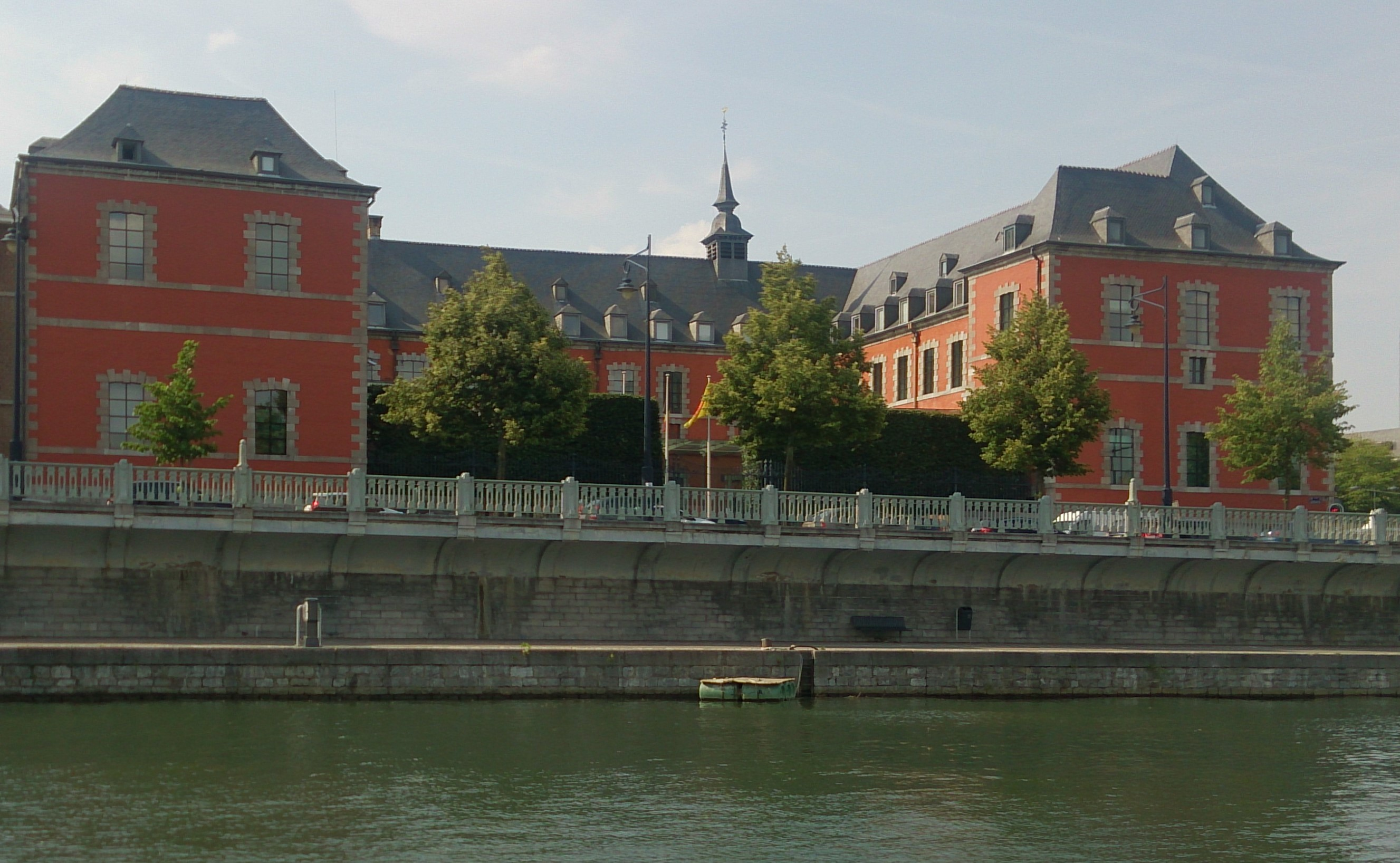 Parlement de Wallonie ancien hospice Hospice Saint Gilles